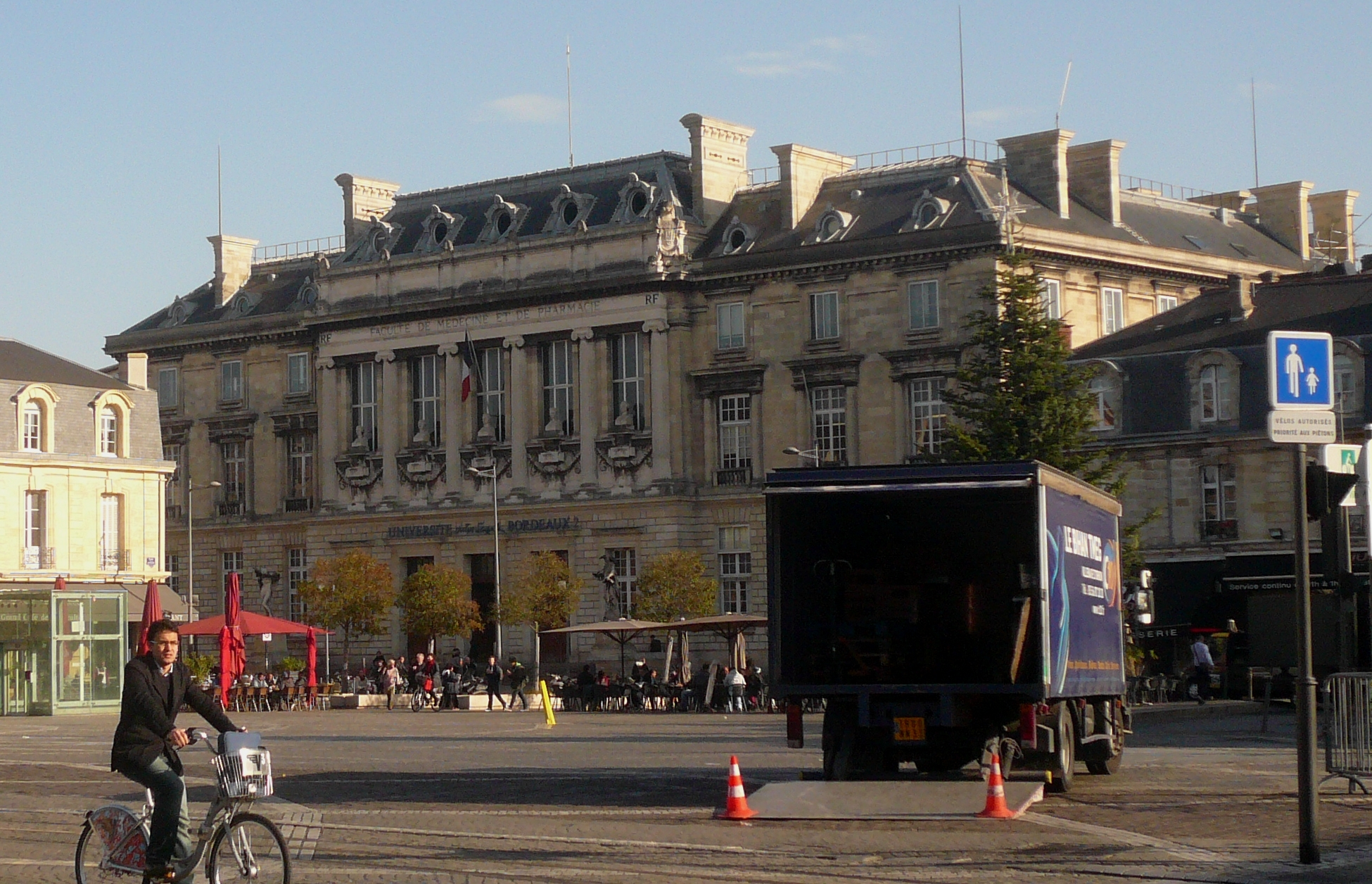 L'université Bordeaux II, place de la Victoire. (Bordeaux, France)